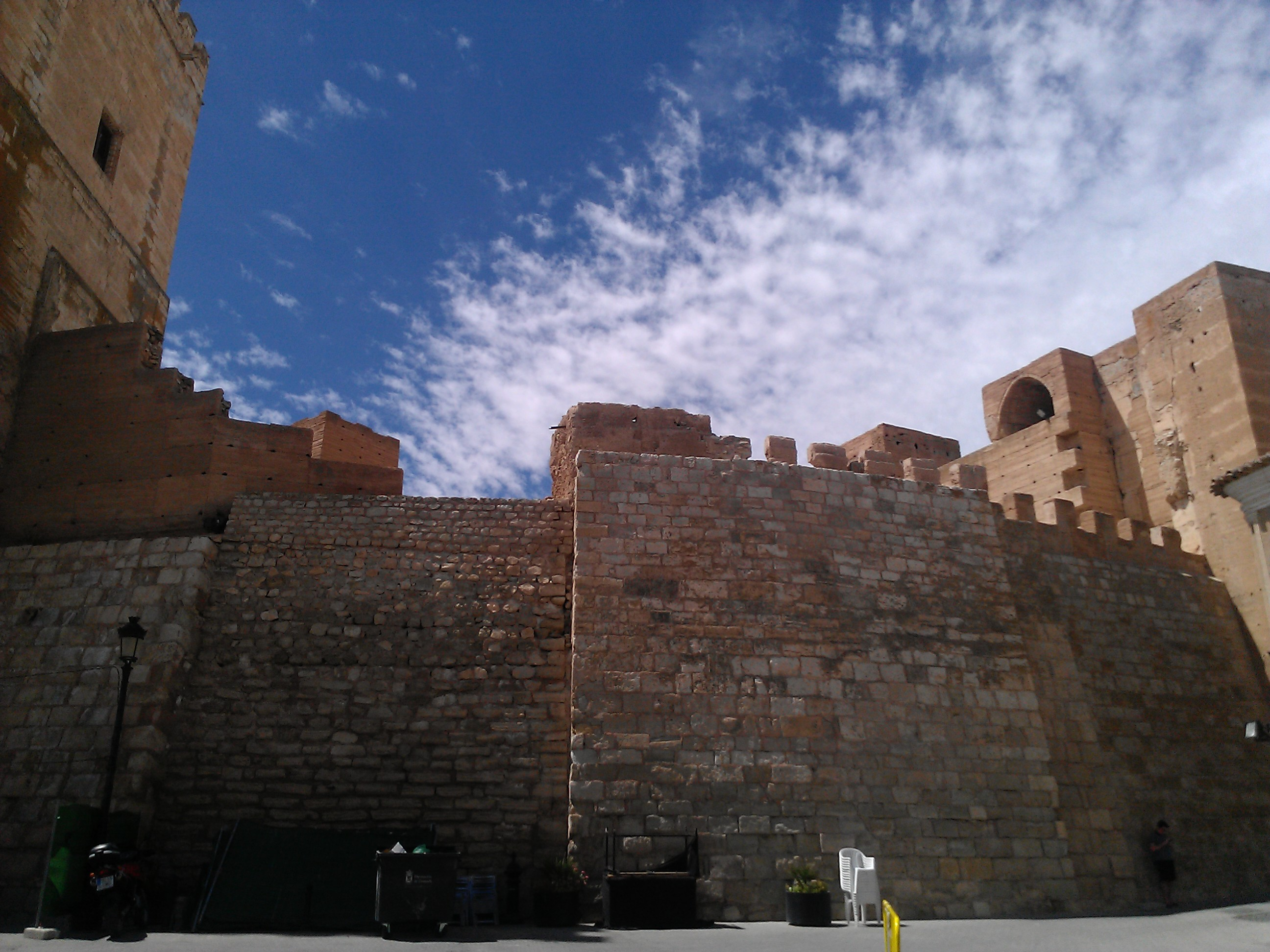 Localidad de Orce